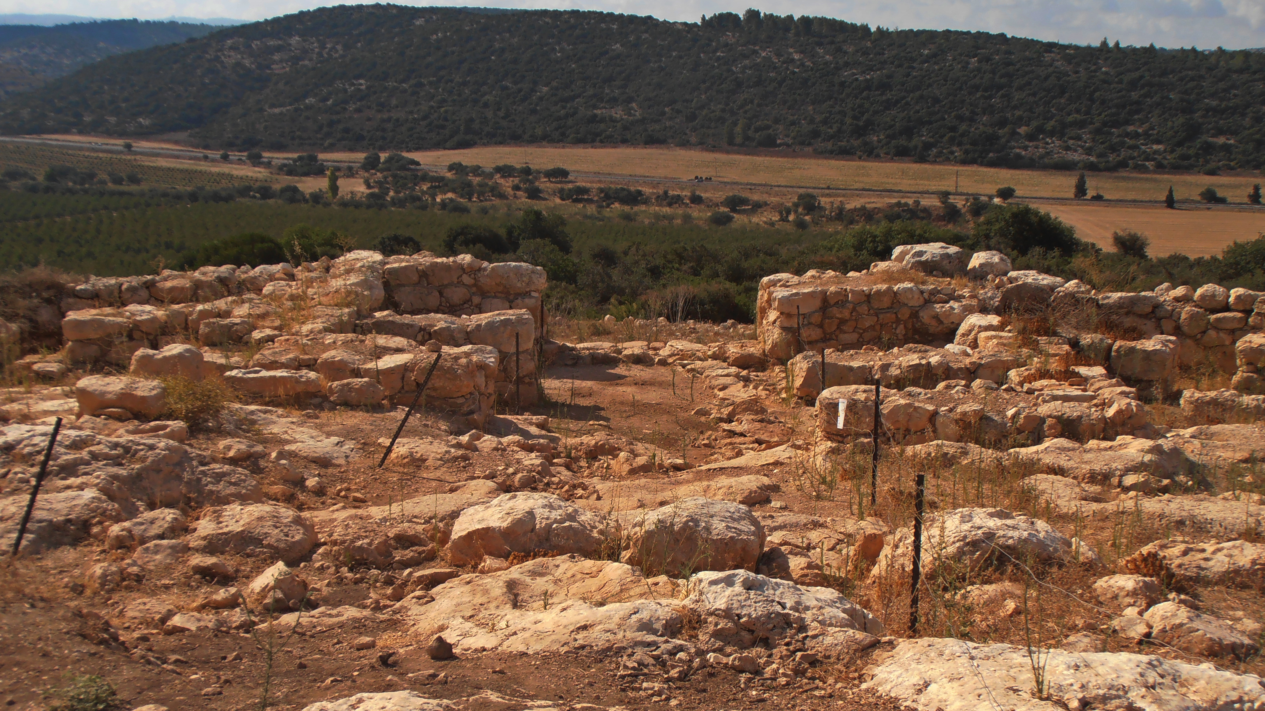 South Gate; Khirbet Qeiyafa, Ha'Ella Valey, Judea, Israel השער הדרומי; חרבת קייאפה, עמק האלה